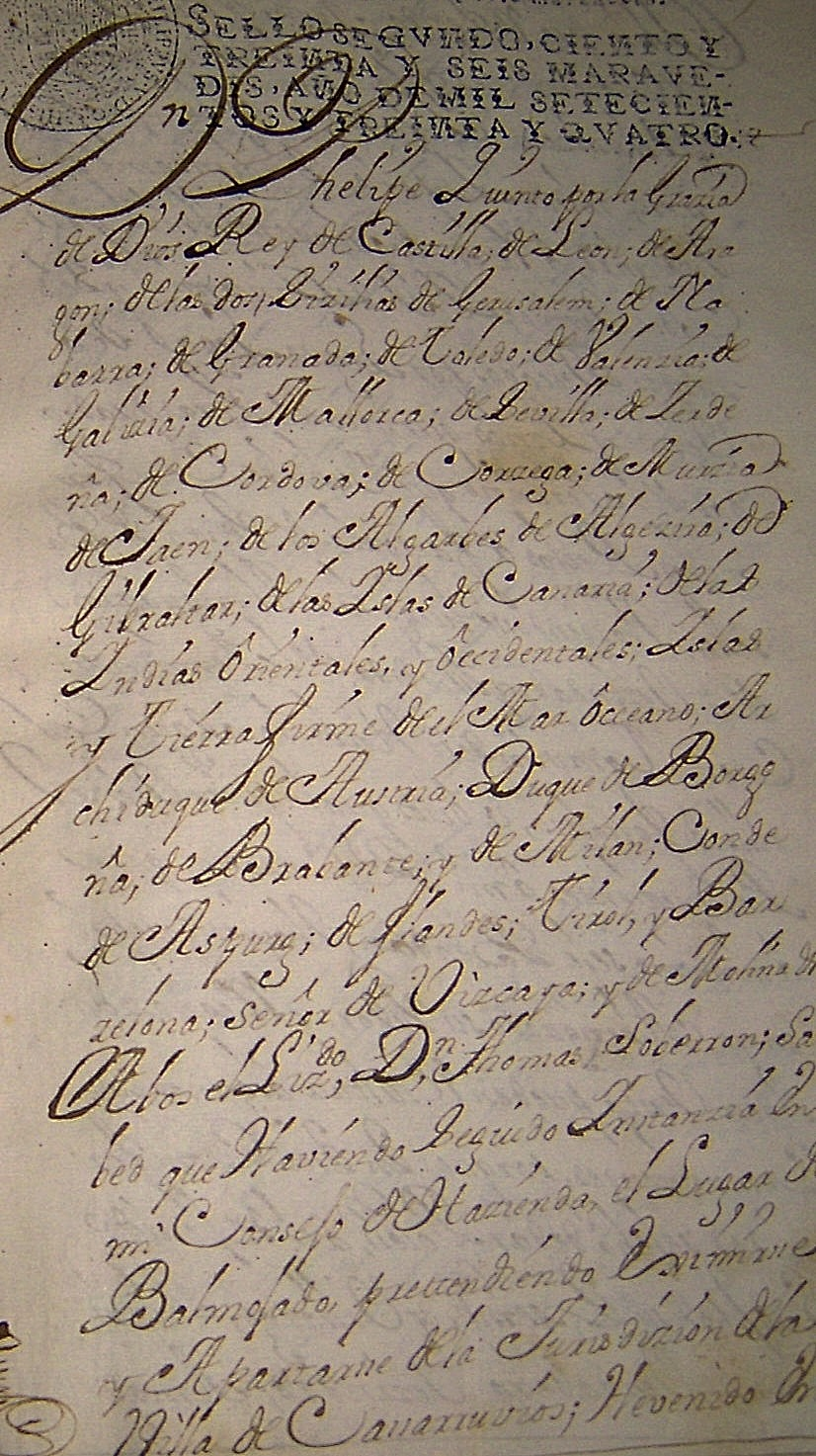 Primera página de la Real Cédula de Villazgo concedida por Felipe V a Valmojado en 1734.